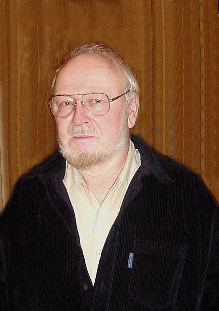 Krzysztof Jackowski, Polish painter